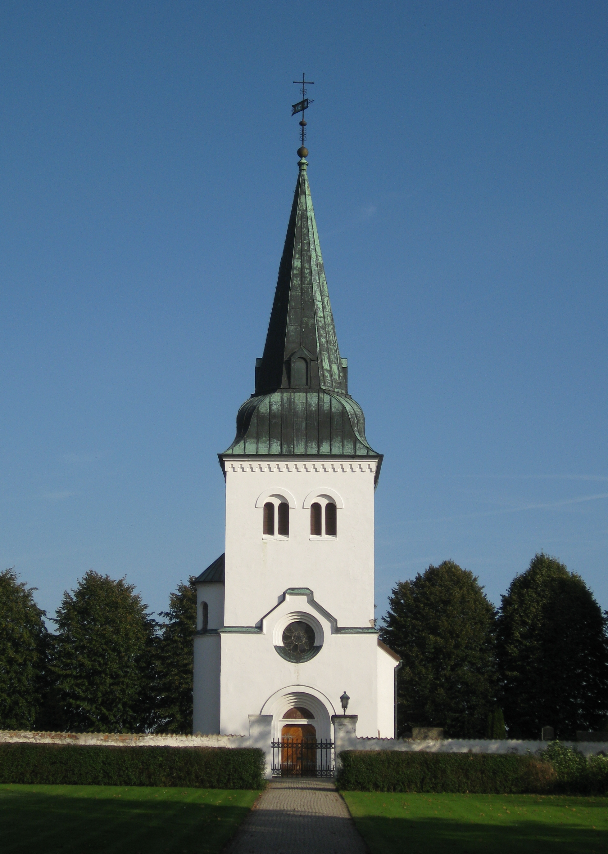 Västra Tommarps kyrka